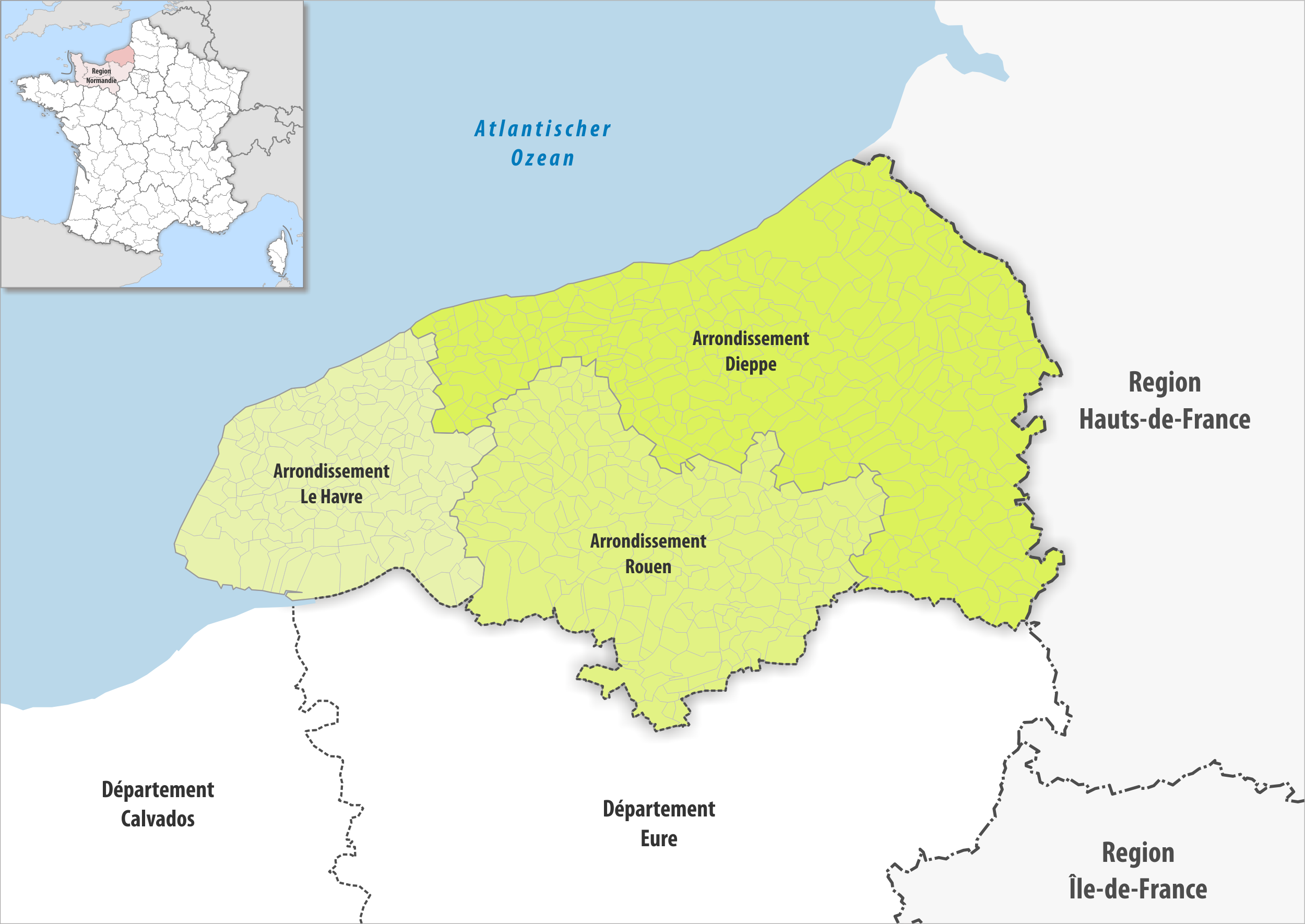 Gemeinden und Arrondissemente im Departement Seine-Maritime